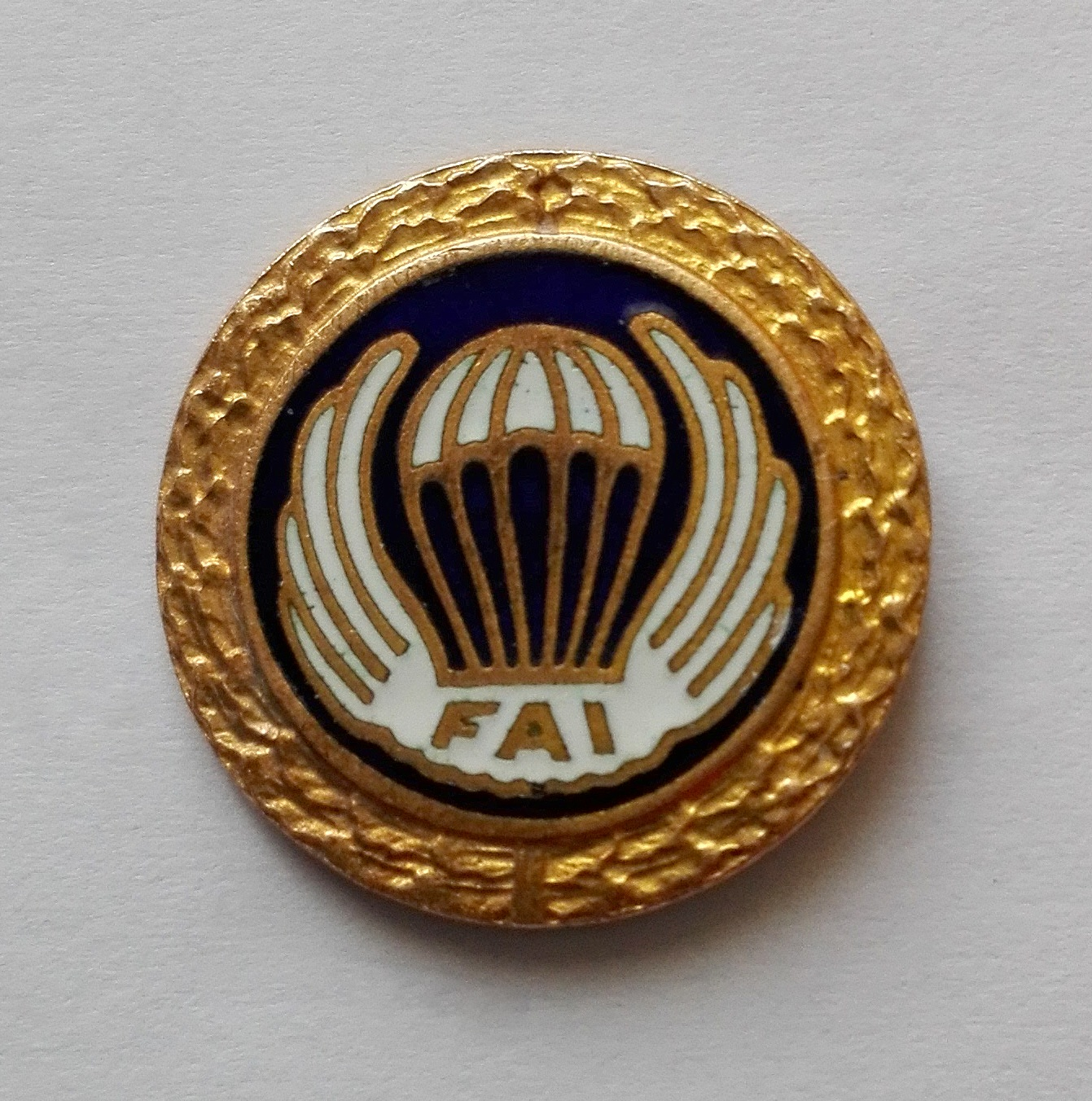 Złota Odznaka Skoczka Spadochronowego FAI